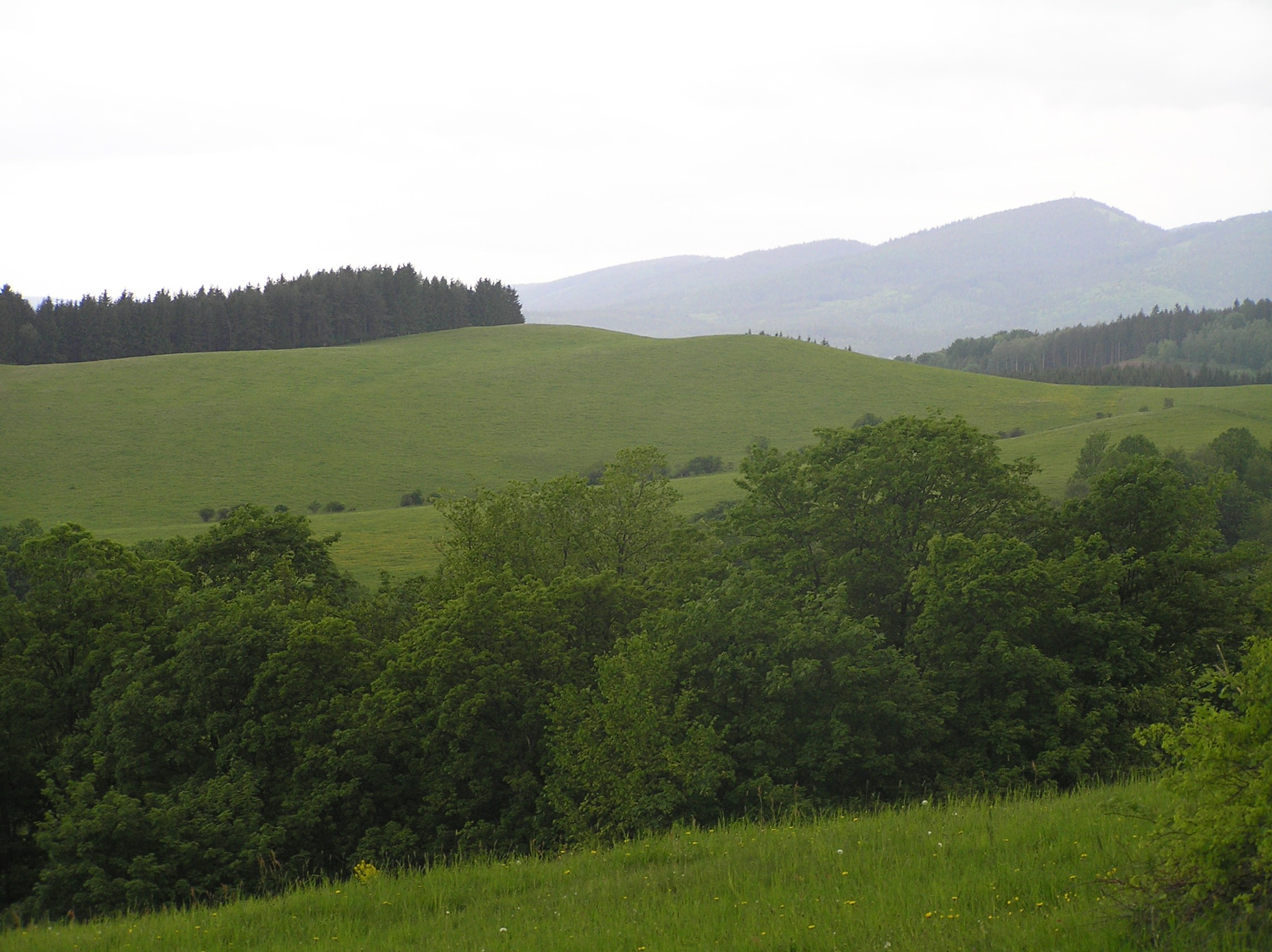 Javoří hory Mountains